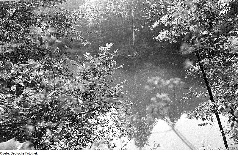 Original image description from the Deutsche FotothekTriebischtal-Schmiedewalde. Kalkabbau, Blick in das Kalkloch